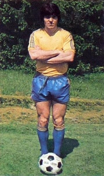 Robert Pintenat en 1976 (FC Sochaux) - 2, 'Panini Football 1976 - 1977', Panini figurina n°331.